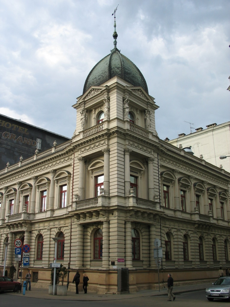 Dom Towarzystwa Ludwika Geyera, Łódź Piotrkowska 74